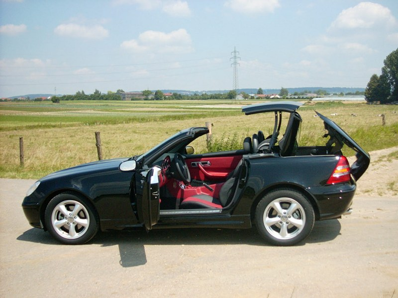 Mercedes-Benz SLK230, W170, Picture taken in summer 2001